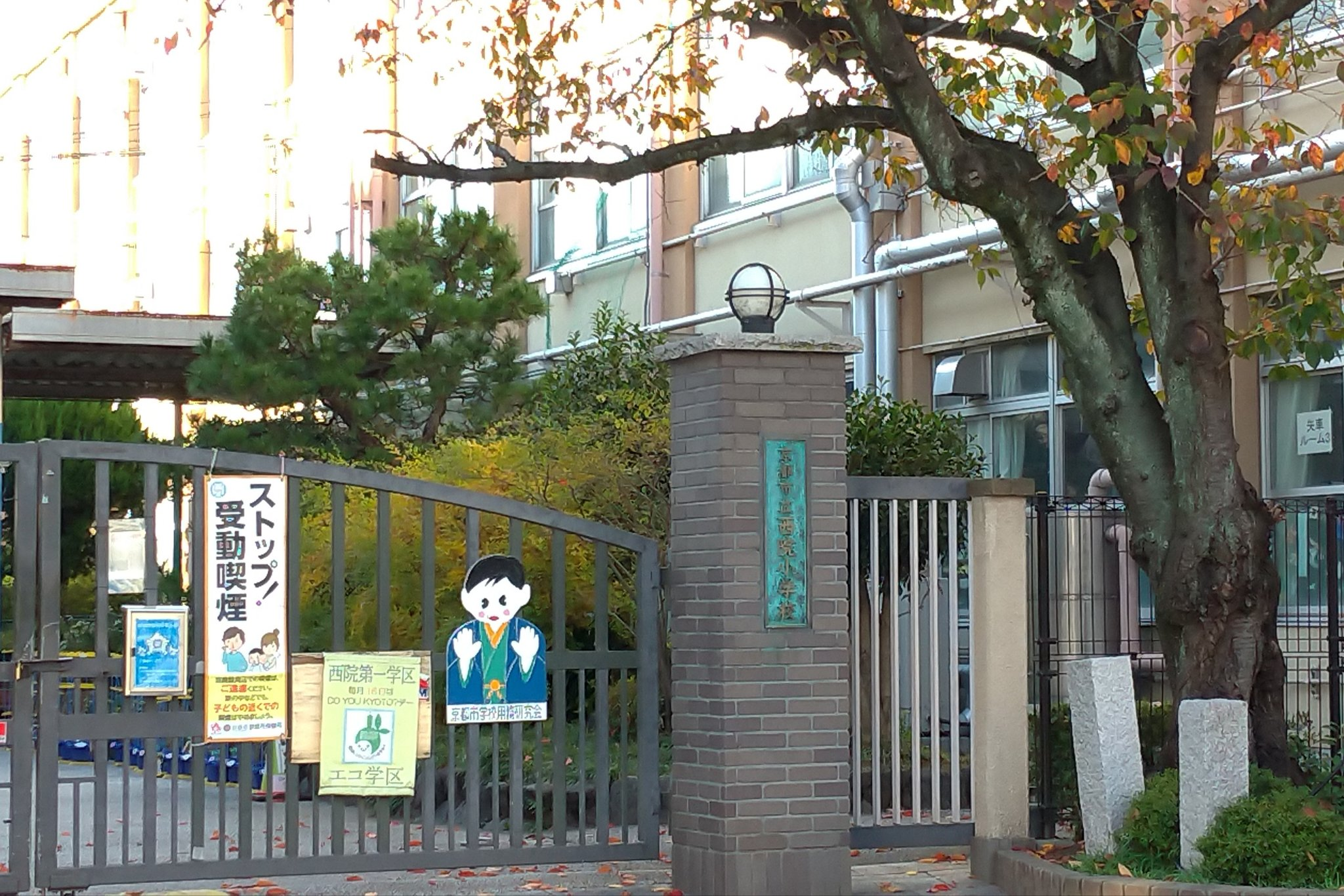 西院小学校の校門。東側から撮影。